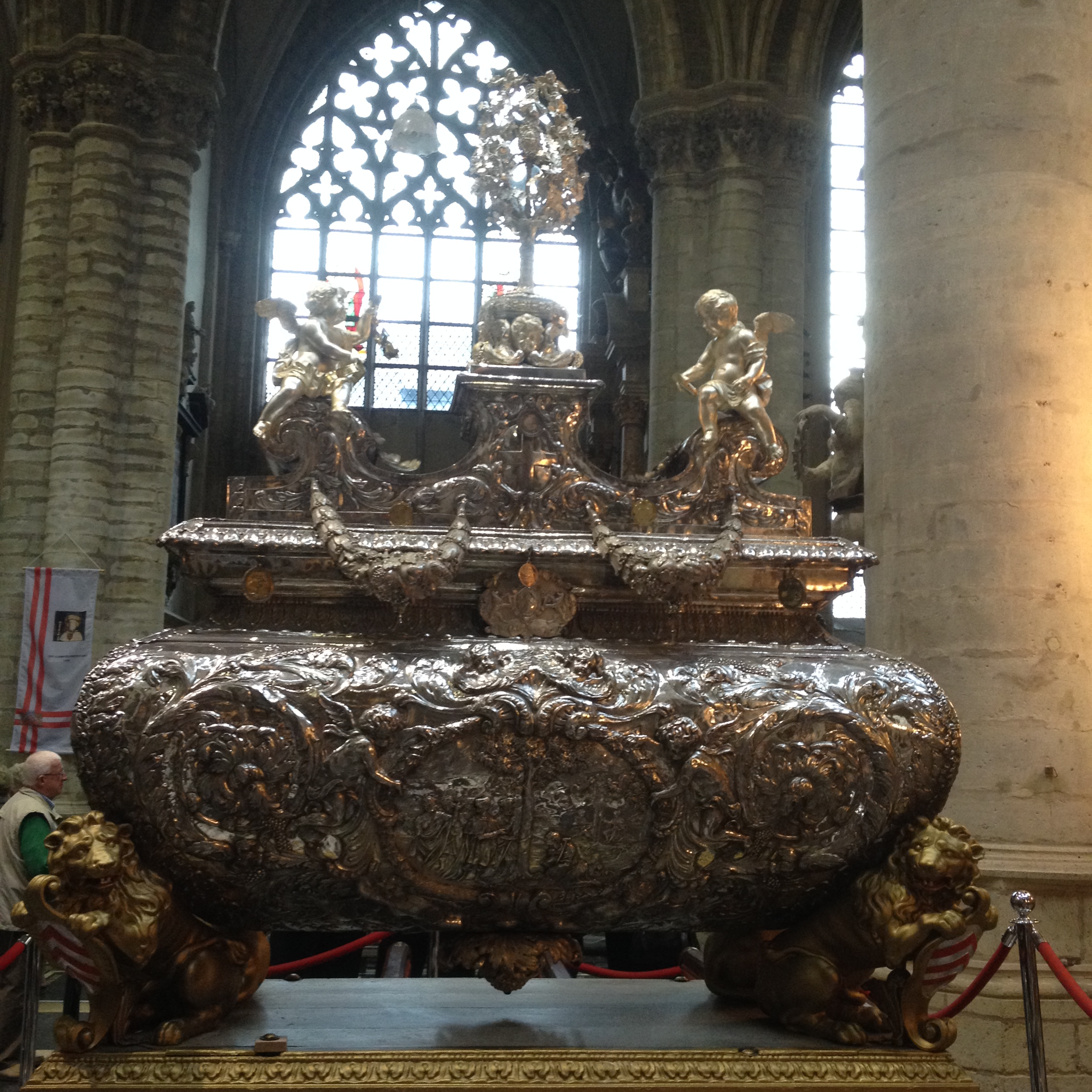 Shrine of Saint-Gummarus (Church of Sint-Gummarus, Lier)